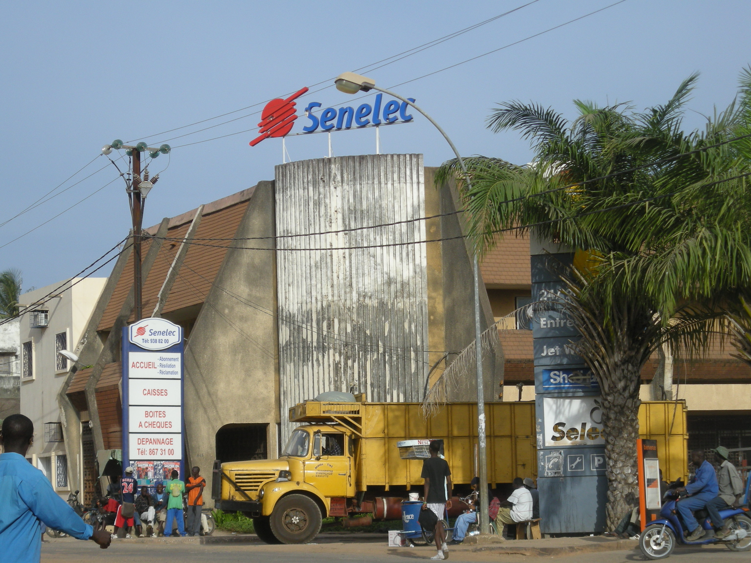 Senelec à Ziguinchor (Casamance, Sénégal)